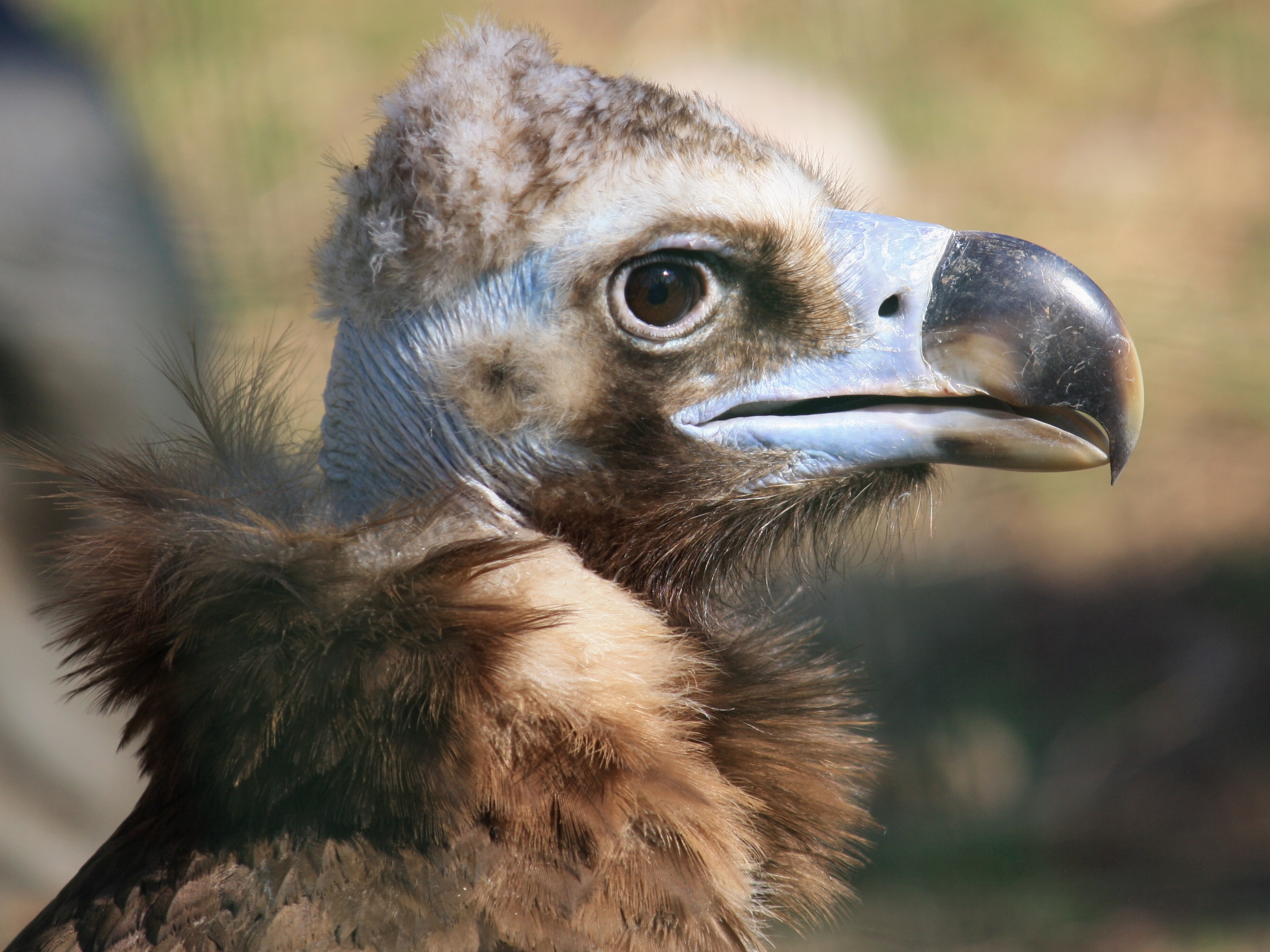 Sup hnědý v pražské Zoo